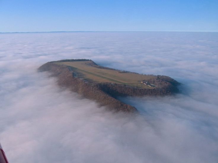 Foto scattata all'alba da un aeromobile a motore che ritrae Segelfluggelände Farrenberg circondata dalla nebbia